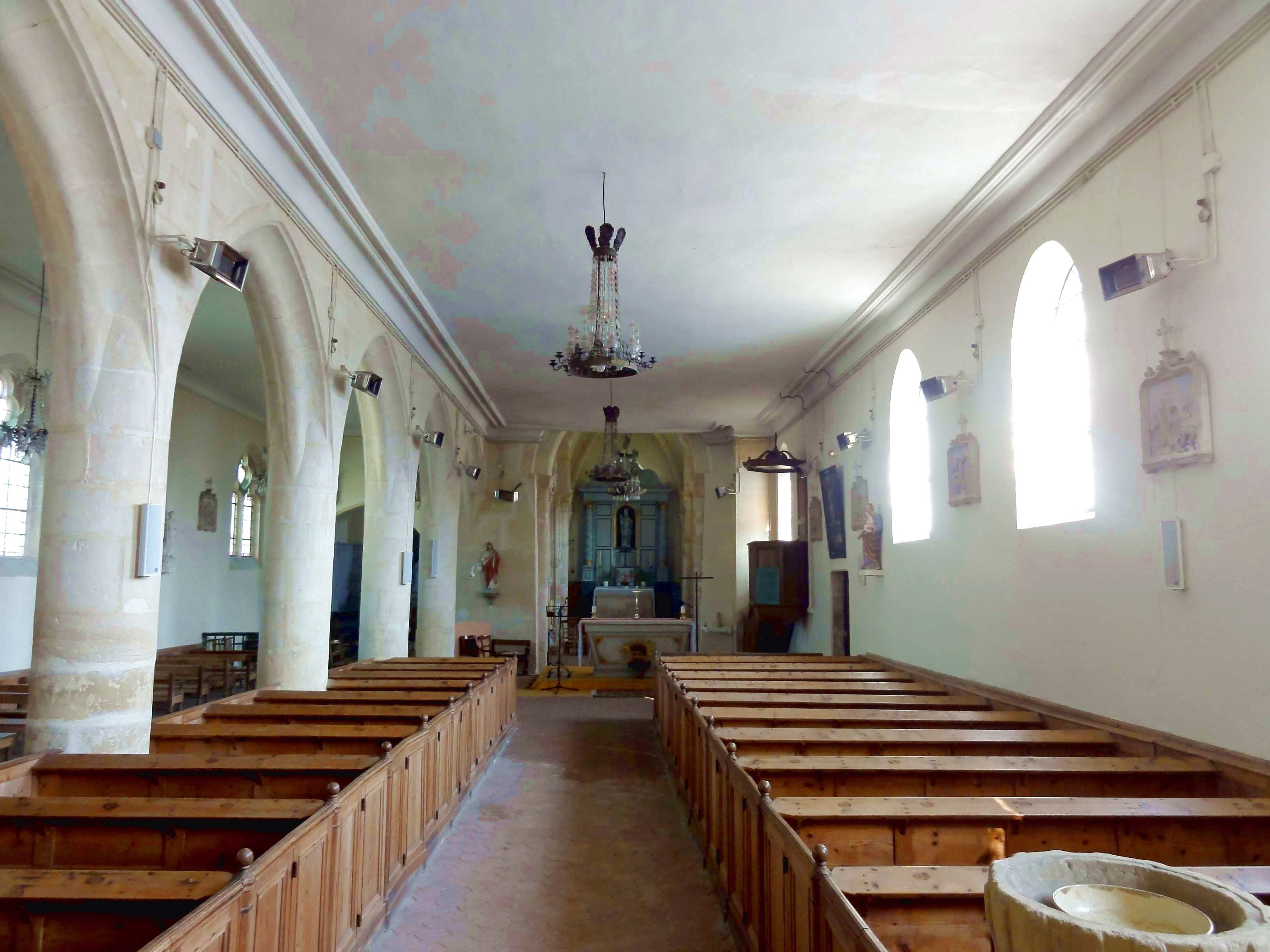 Intérieur de l'église - voir titre.